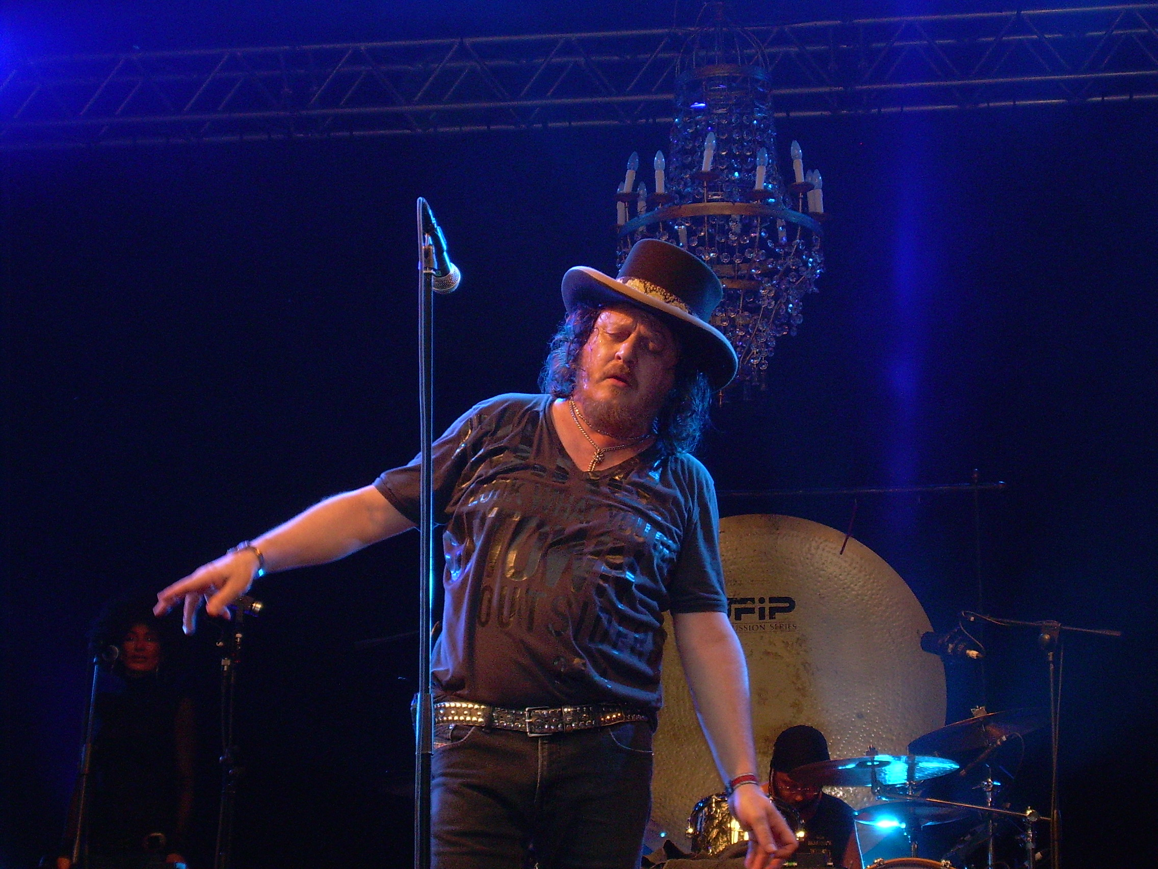 Italian singer Zucchero live at Skanderborg Festival 2007, Denmark